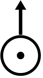 Условное обозначение ДЗОТа на географических картах